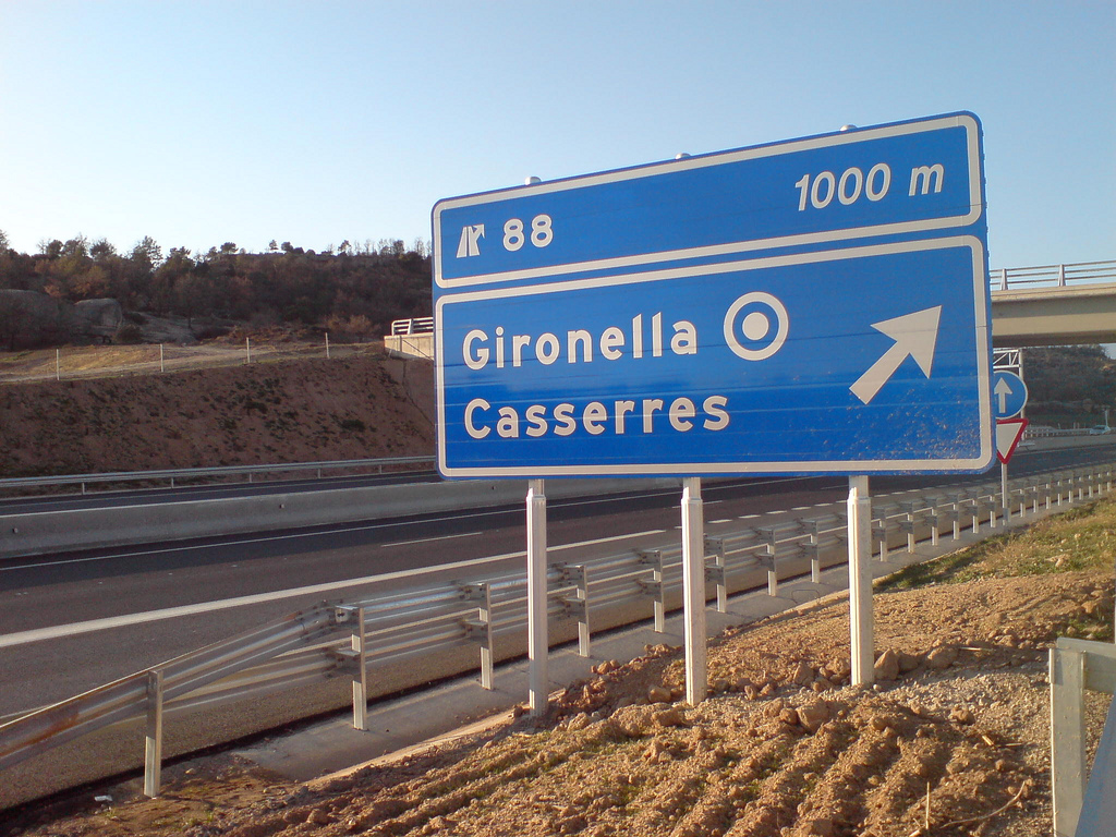 Sortida 88 de la C16DSC00606